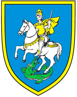 Grb Občine Šenčur